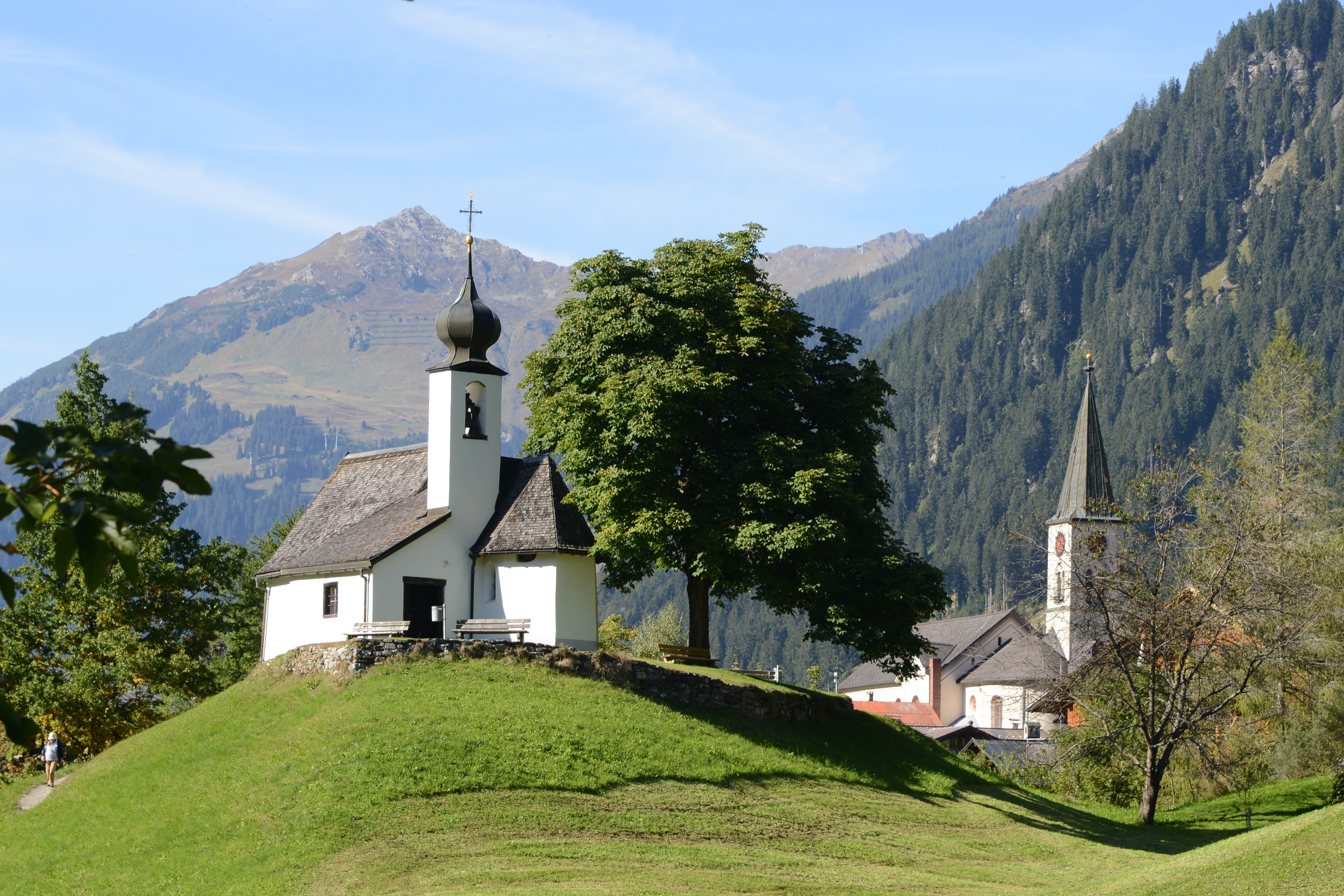 Kapelle Maria Schnee links und rechts die Michaelskirche in Gaschurn im Montafon, Vorarlberg.